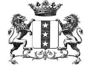 Wappen der französisch-deutschen Adelsfamilie von Parseval